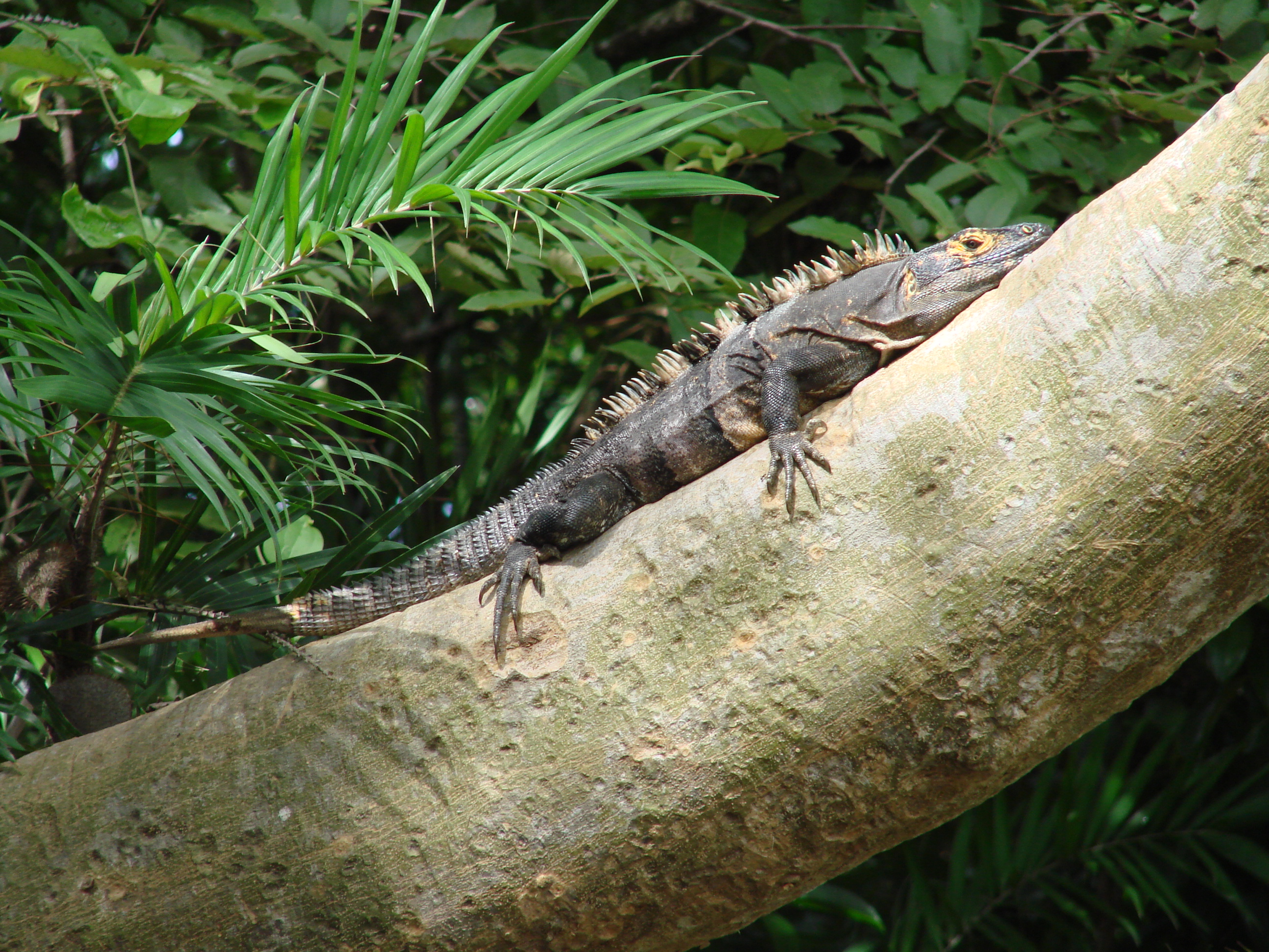 Ctenosaura similis, iguana negra (garrobo), on a tree near Tempisque River, Puerto Humo, Guanacaste, Costa Rica